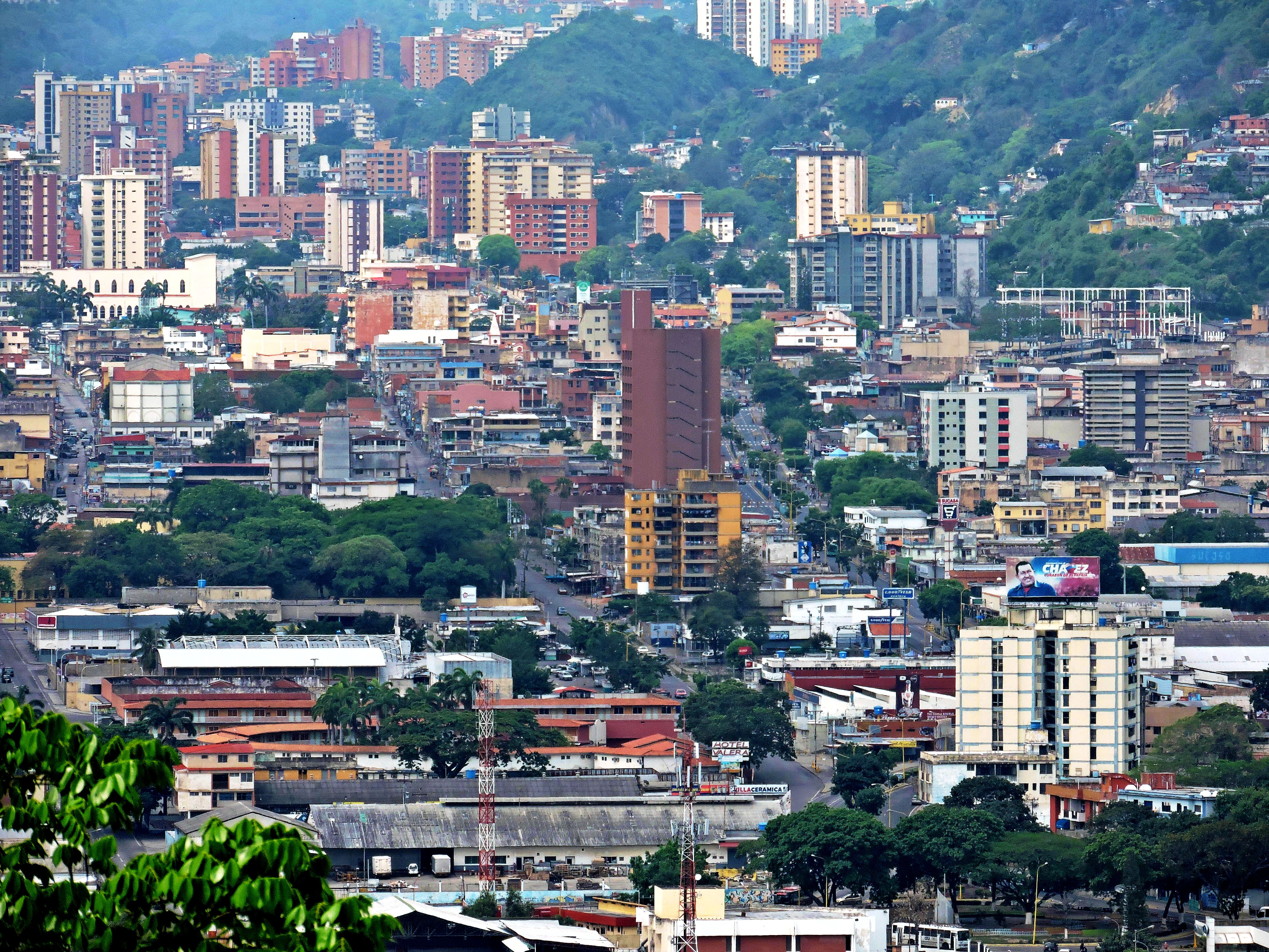 Valera city, Venezuela